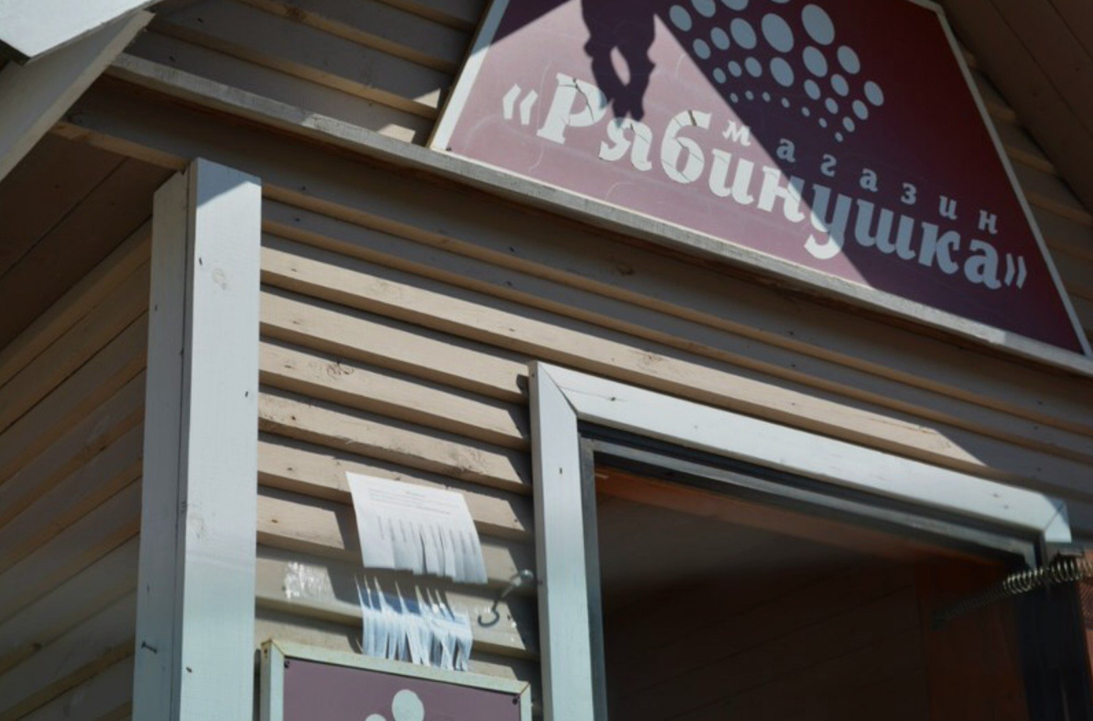 Рябинушка